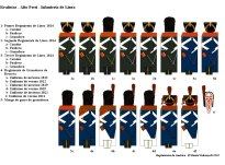 Uniformes de Regimientos realistas de linea del Alto Perú 1811 1821